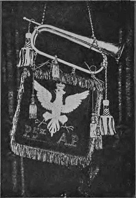 Trąbka 5 Lwowskiego Pułku Artylerii Lekkiej